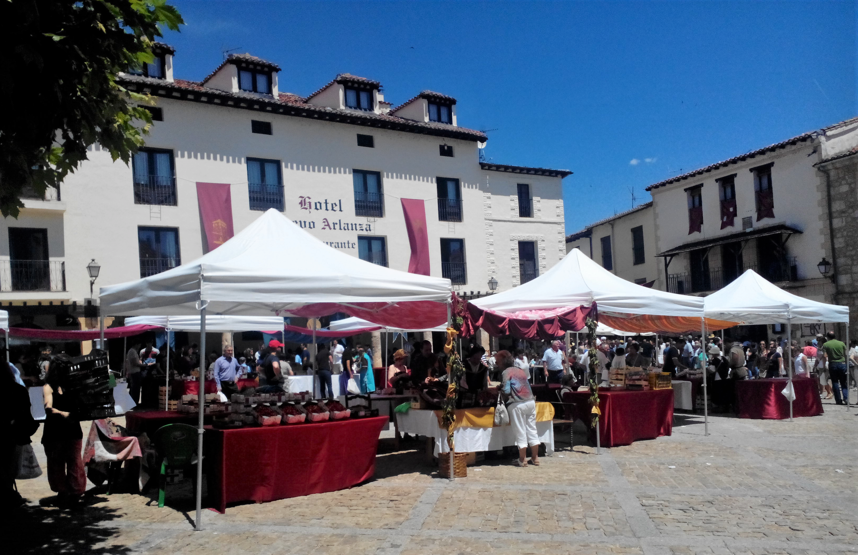 XXVI Fiesta de la cereza y XIX Encuentro medieval de Covarrubias (Burgos - España) celebrados el 12 y el 13 de julio de 2014. Puestos de venta de cerezas en la plaza Mayor.